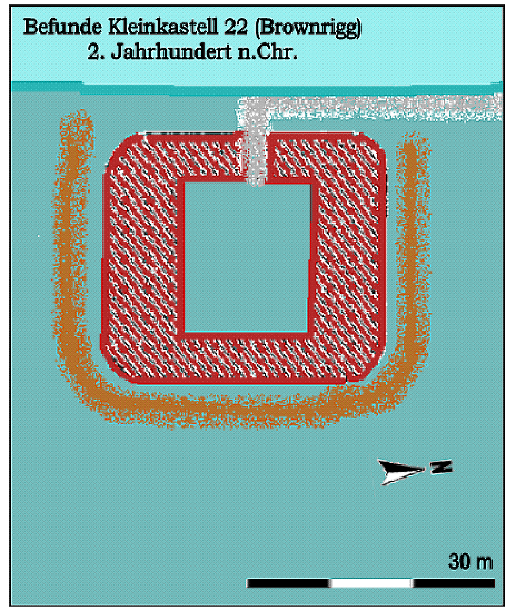 Befundplan des römischen Kleinkastell Brownrigg (KK 22) an der Westküste von Cumbria, 2. Jahrhundert n.Chr.